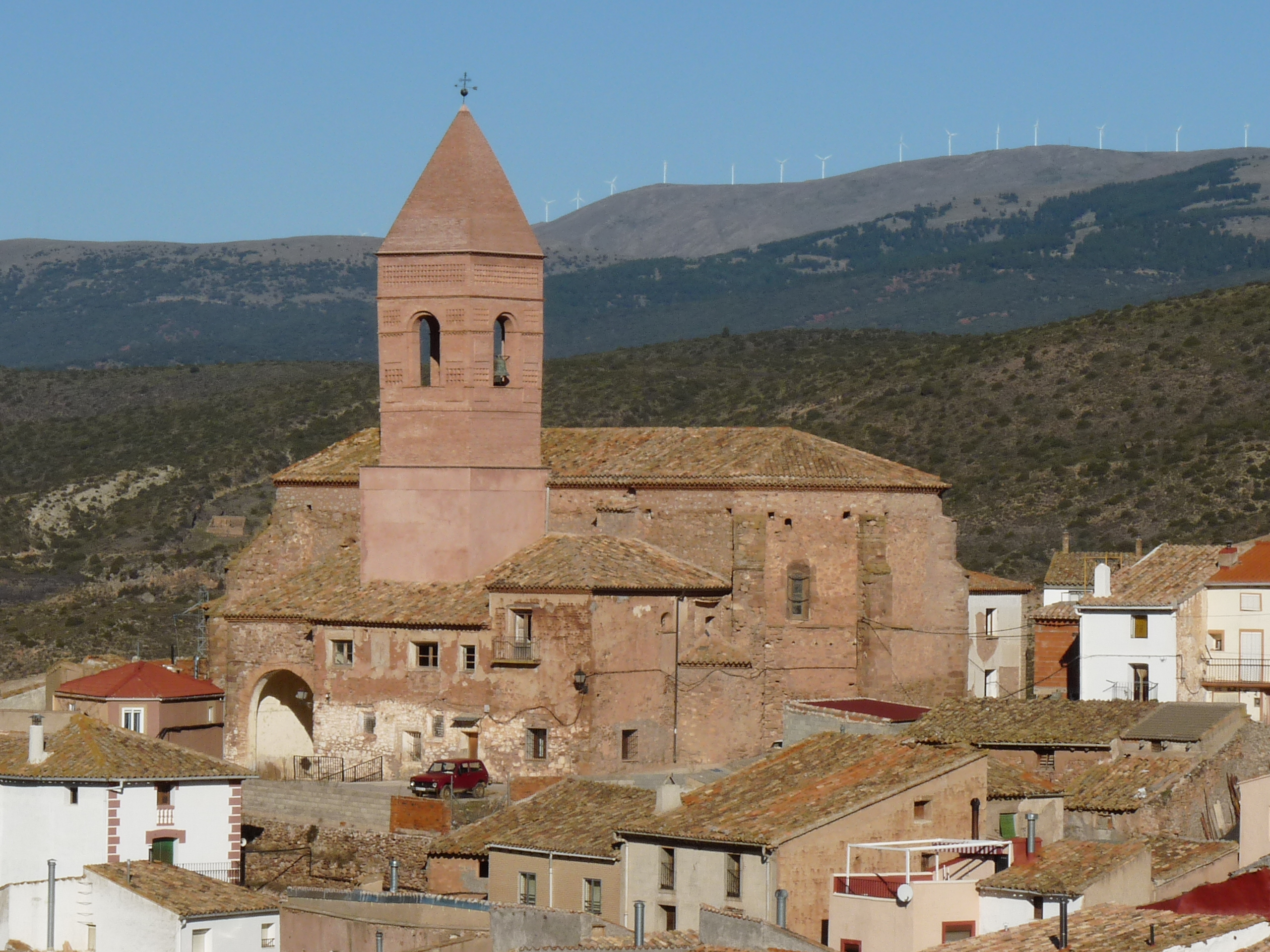 Aranda de Moncayo - Iglesia de Nuestra Señora de la Asunción s. XVI (véase página del ayuntamiento)